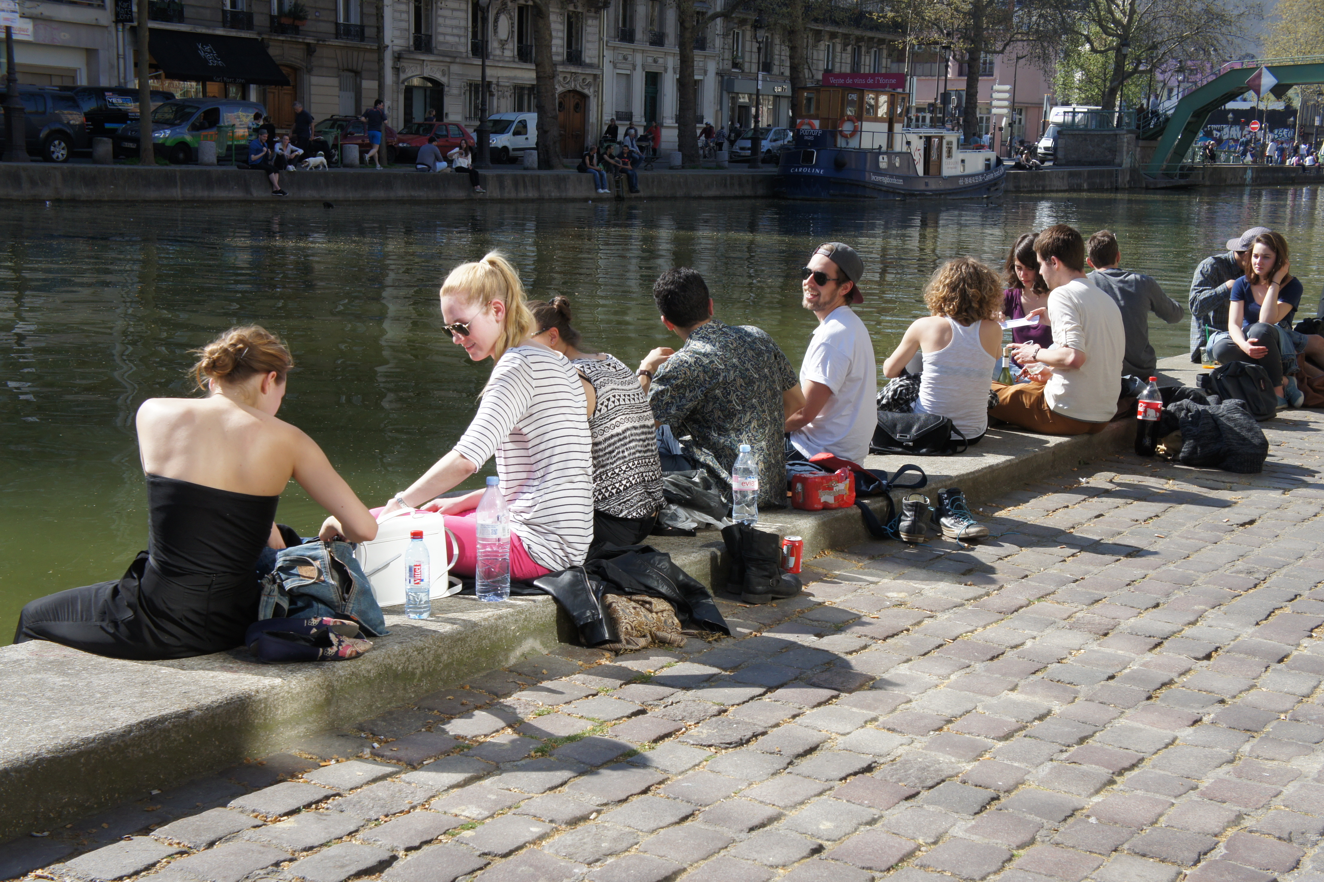 Canal Saint-Martin, Paris X